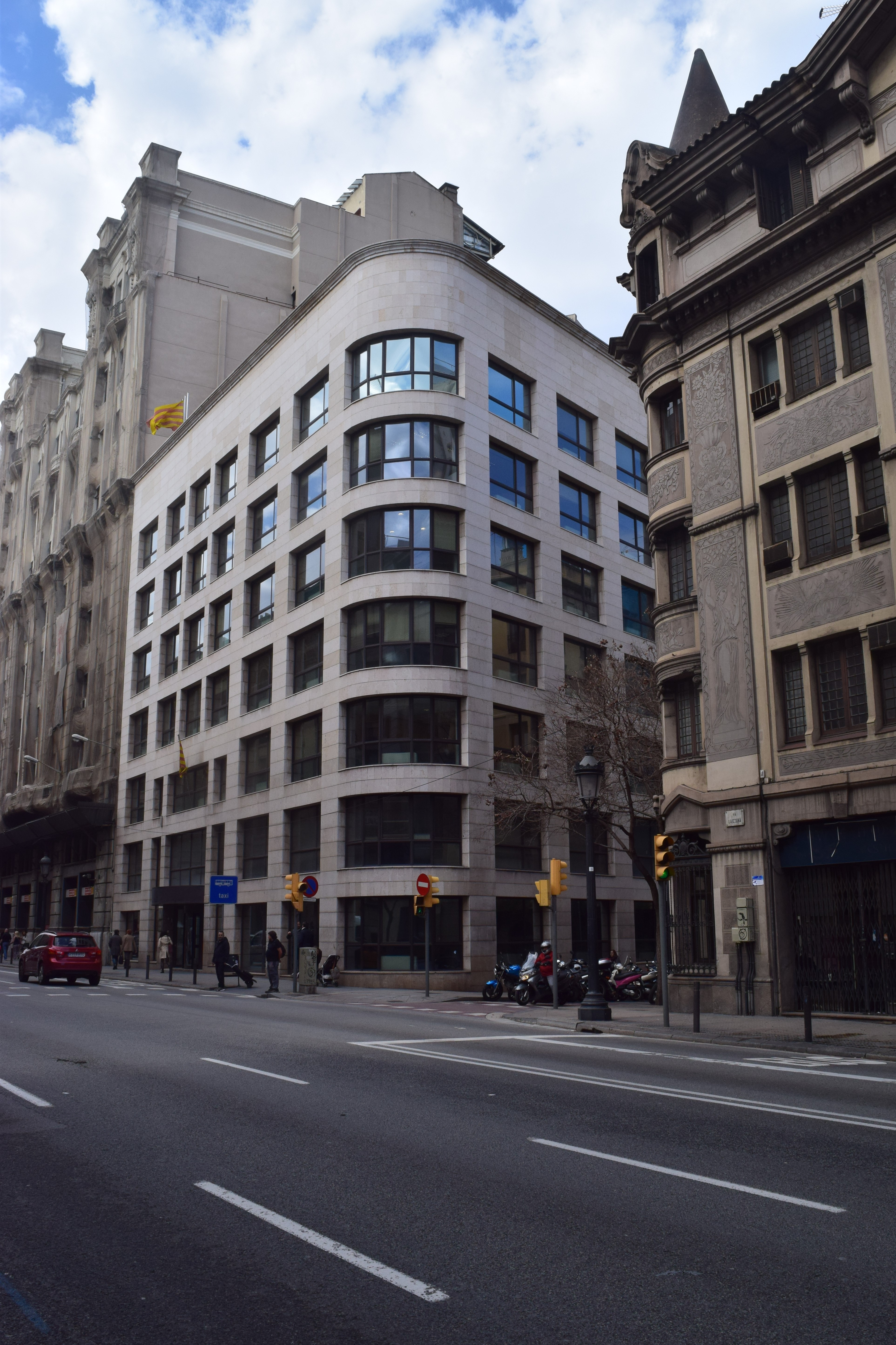 Vista de l'edifici situat a la Via Laietana nr. 14 de Barcelona. En aquest indret s'hi trobava ubicat l'antic Cinema Princesa, el qual ocupat el 1996 i convertit en un centre social okupat.